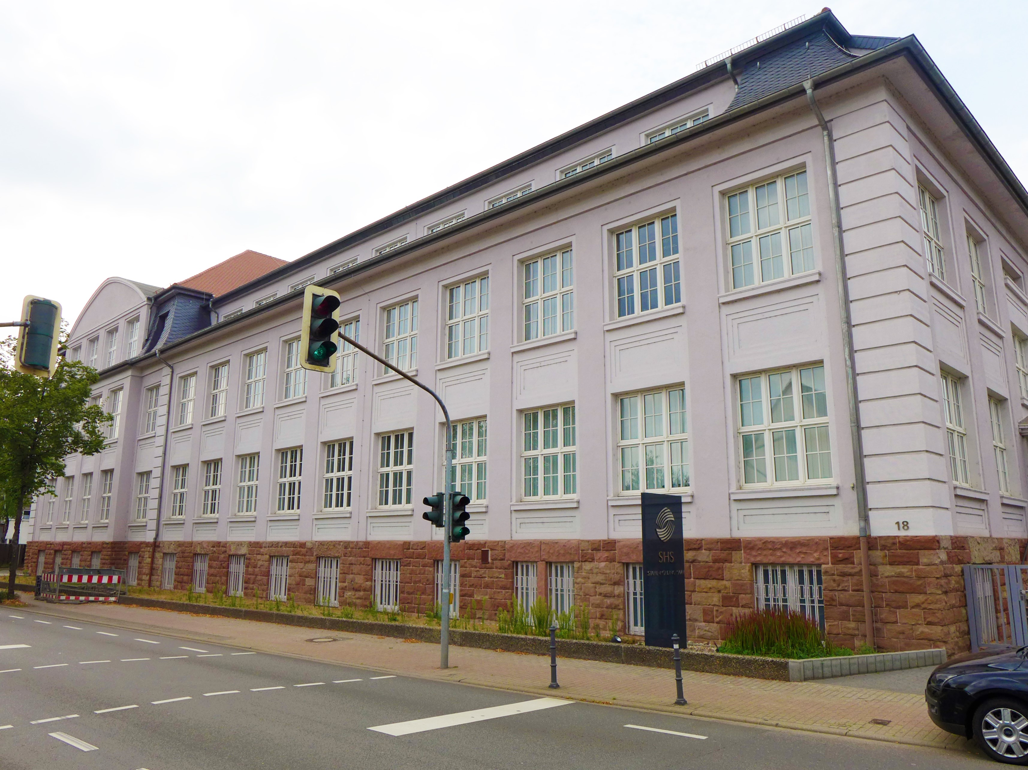 Dillingen/Saar, Ehemalige Meguin-Schule